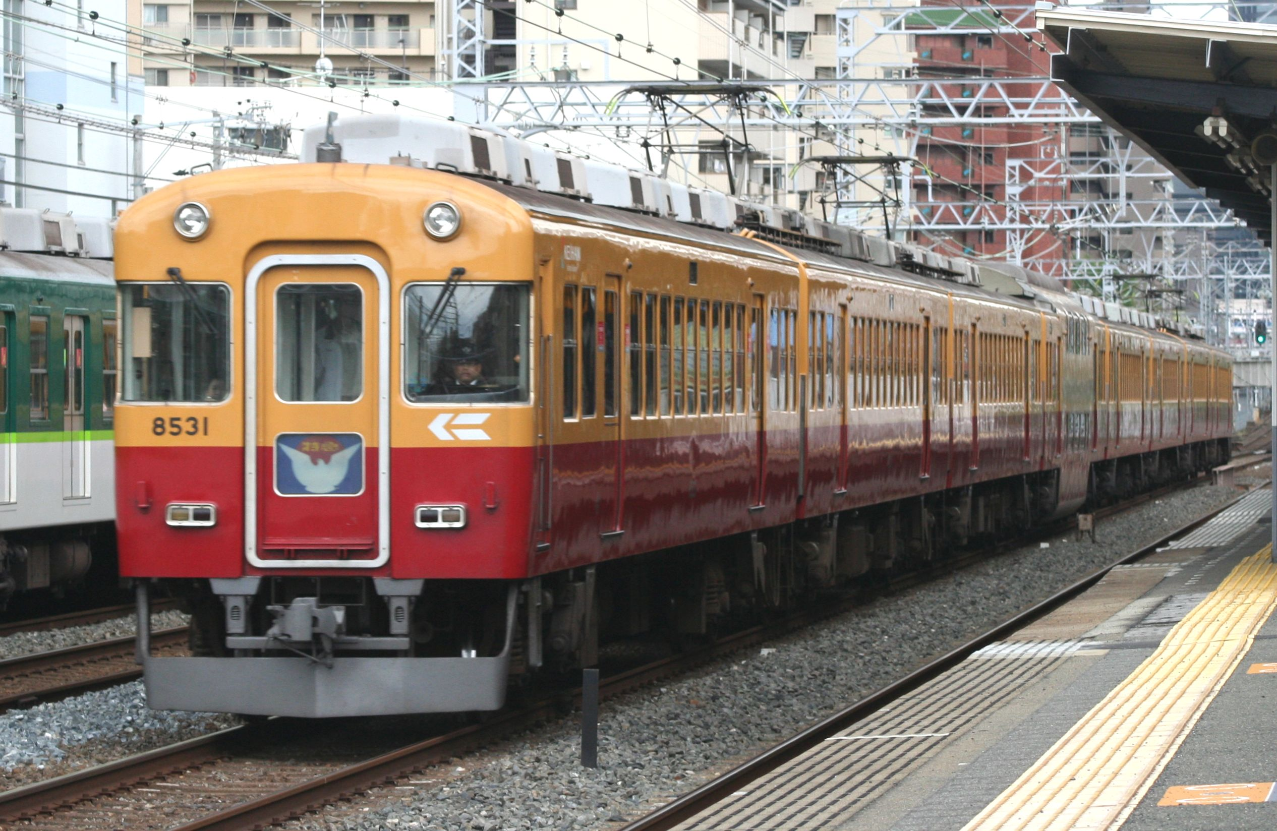 京阪3000系電車 (初代)